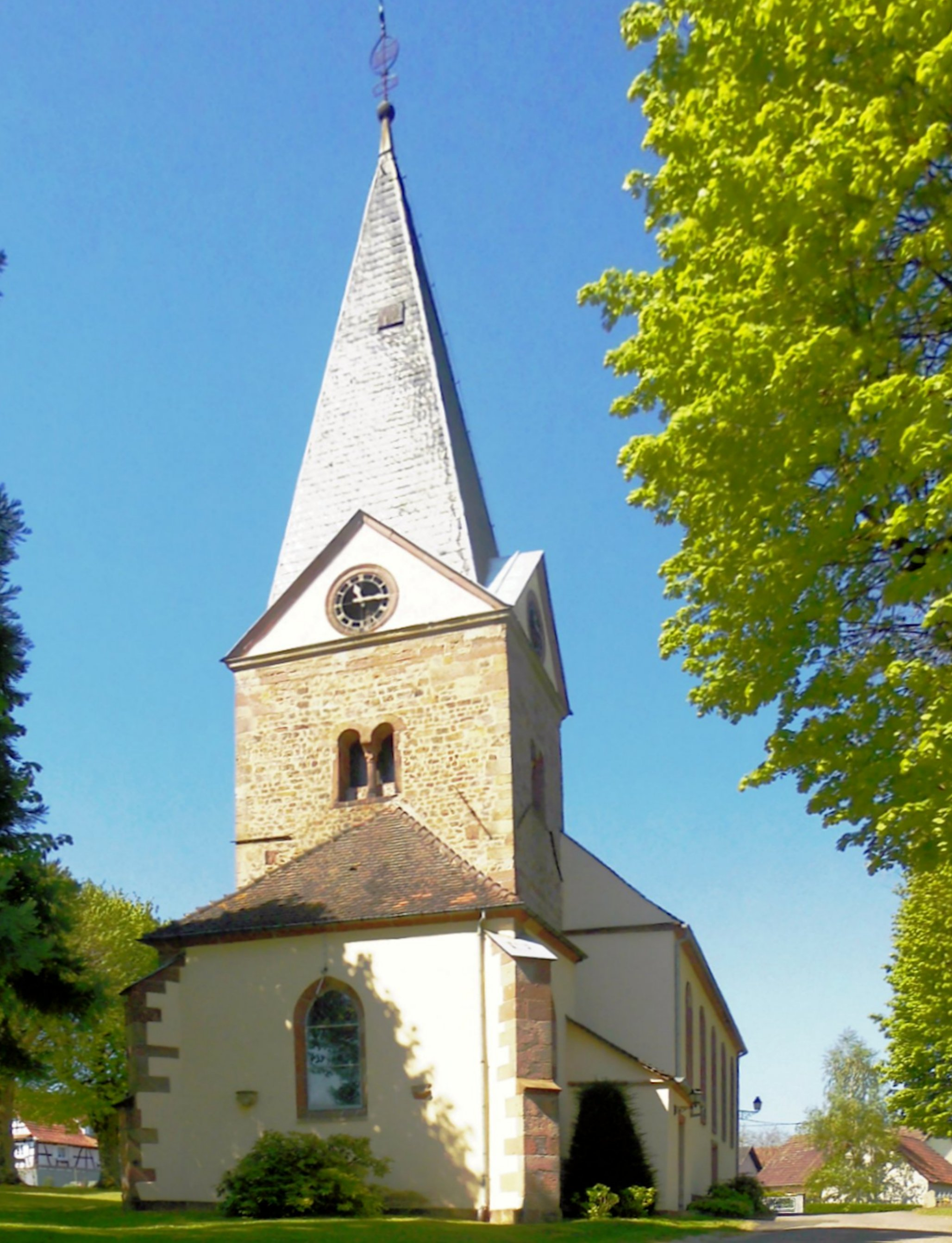 L'église protestante Saint-Laurent de Steinseltz